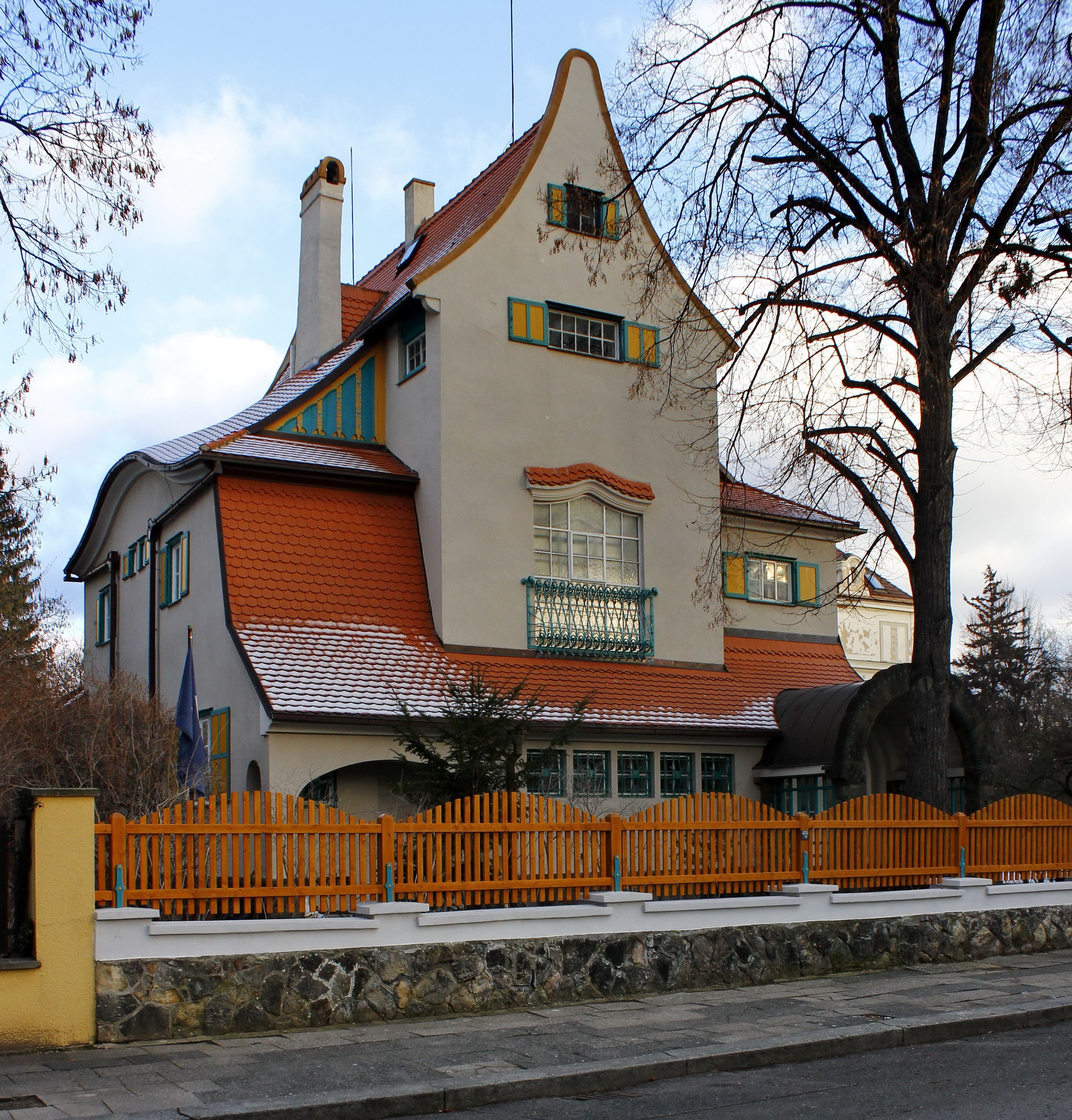 Dušan Jurkovič: Vila Jana Náhlovského, 1907-1908. Praha 6 - Bubeneč, č. p. 284, Suchardova 4